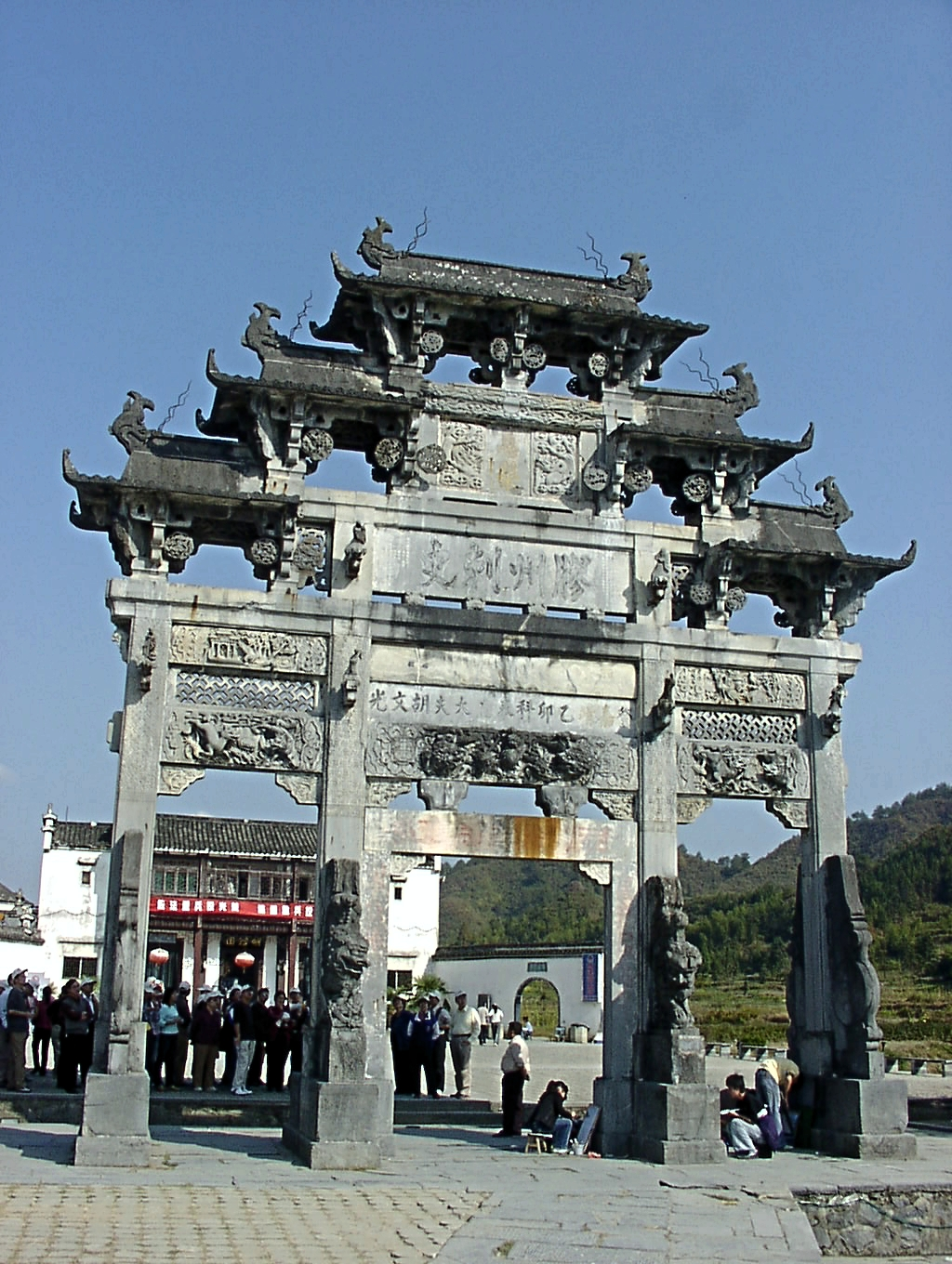 Arco triunfal Photograph of the gate in front of the town of Xidi, in Anhui Province, China on October 30th, 2004. Photograph taken by Rolf Müller.